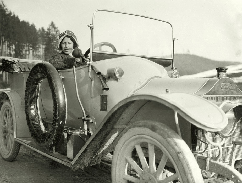 Gertrud Müller (later Gertrud Dübi-Müller) in her car Pic-Pic